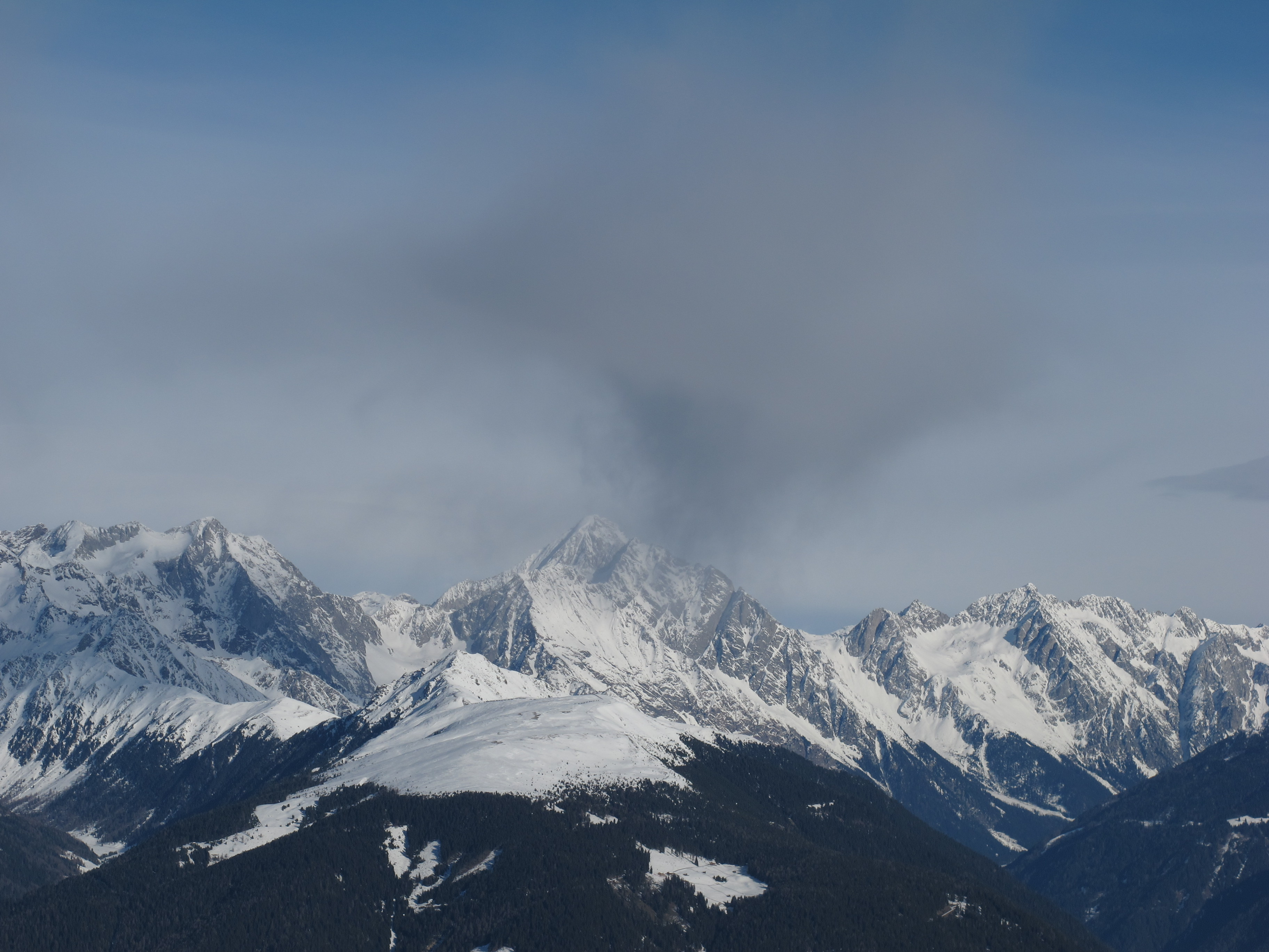 Nordföhn über der Rieserfernergruppe. Blick vom Kronplatz.